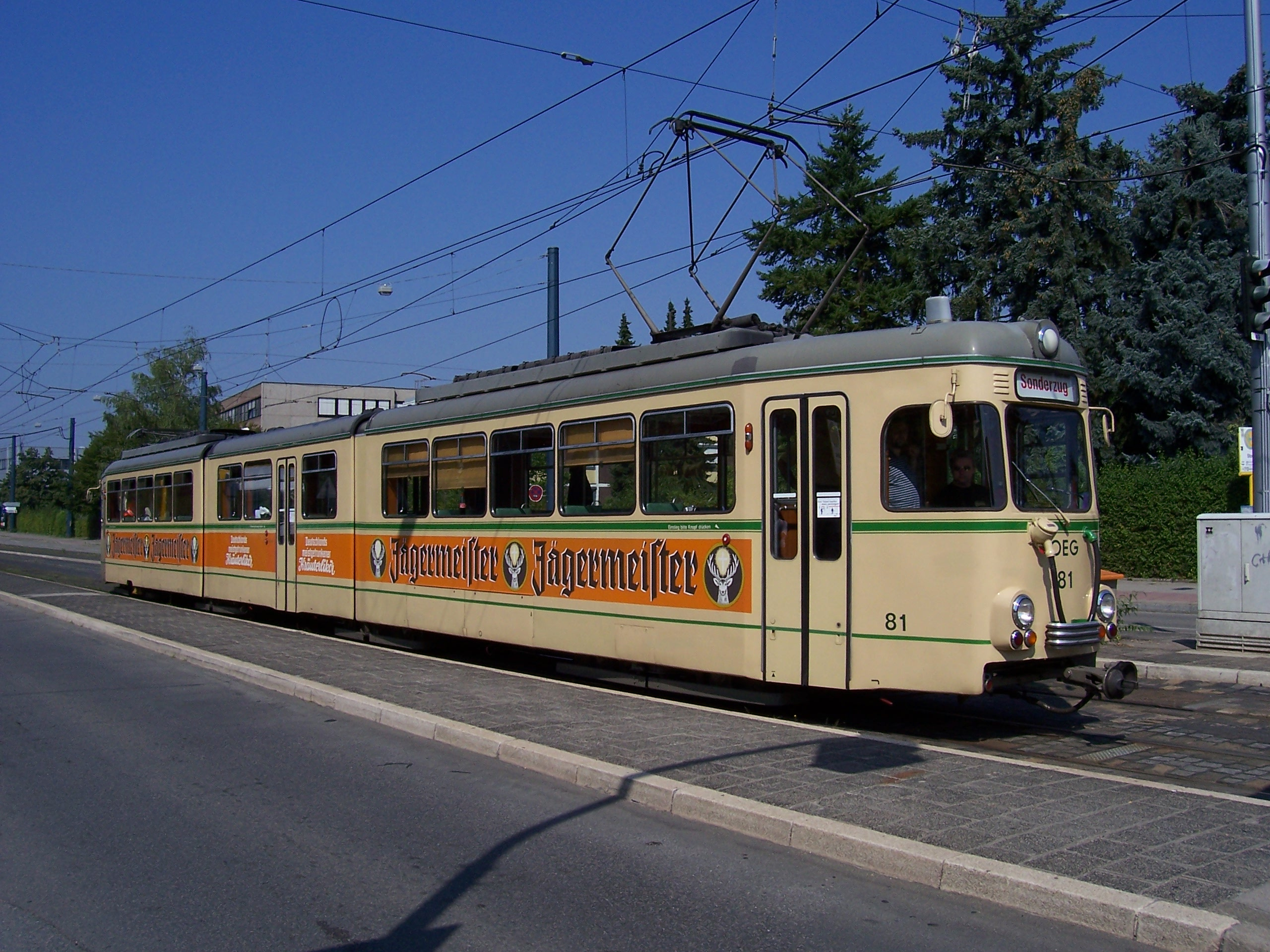 OEG 81 in Heidelberg, Germany